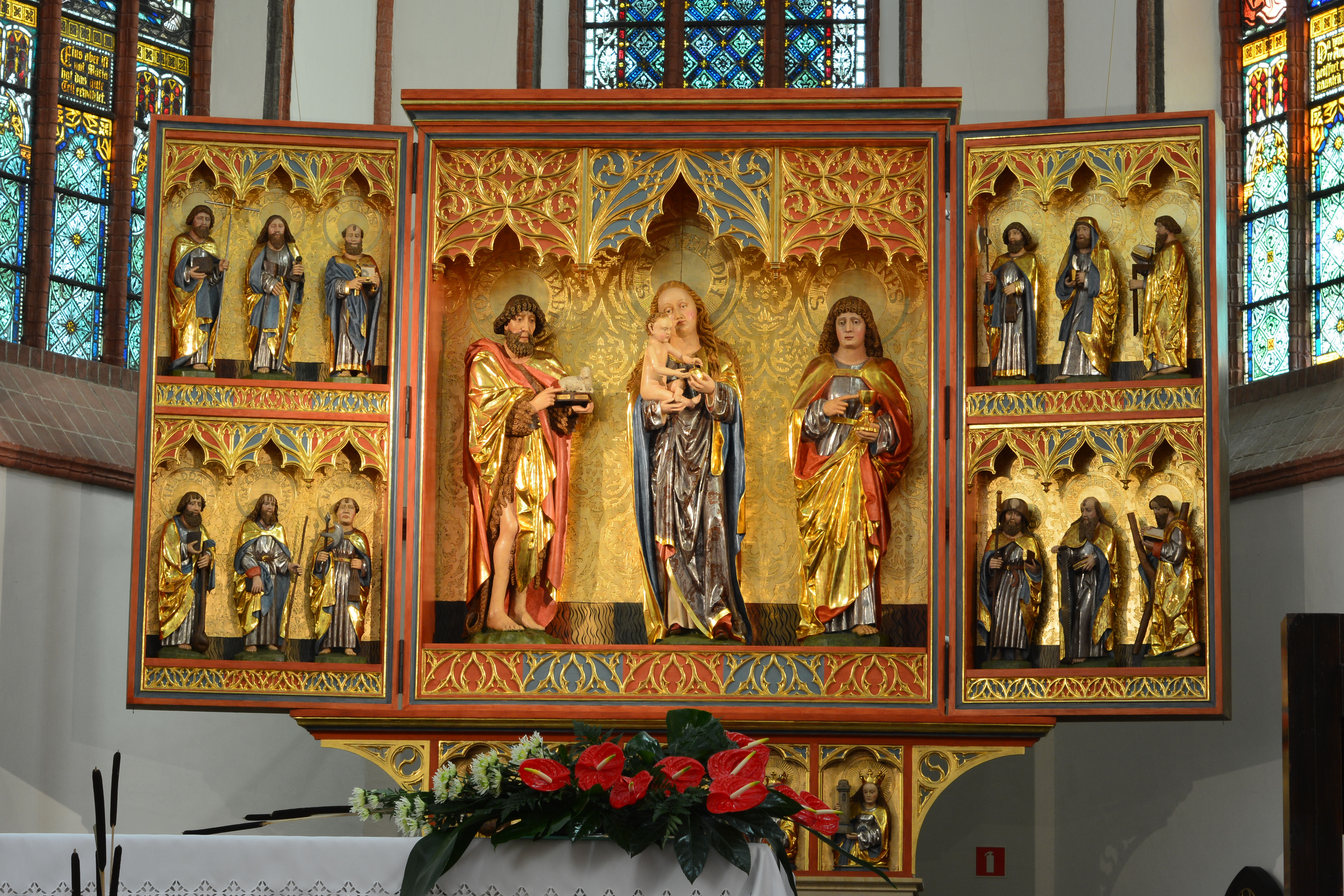 Koszalin, kościół katedralny p.w. Niepokalanego Poczęcia NMP, 1300-1333